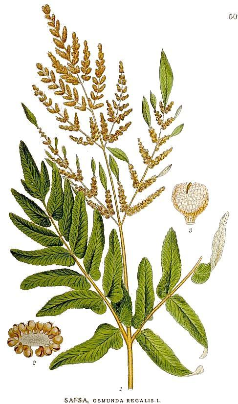 Original Description Safsa, Osmunda regalis L.